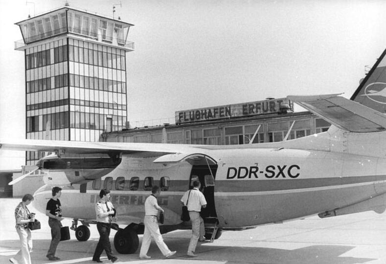 ADN-ZB-Hirschberger-31.7.1990-Erfurt: Flughafen- Am 18. startet das erste Flugzeug vom Typ L 410 zum Linienflug nach Berlin. Die Strecke wird wochentags in beiden Richtungen zweimal täglich mit der 13 Passagiere fassenden Maschine beflogen. Der einstündige Flug kostet 189,-- Mark.